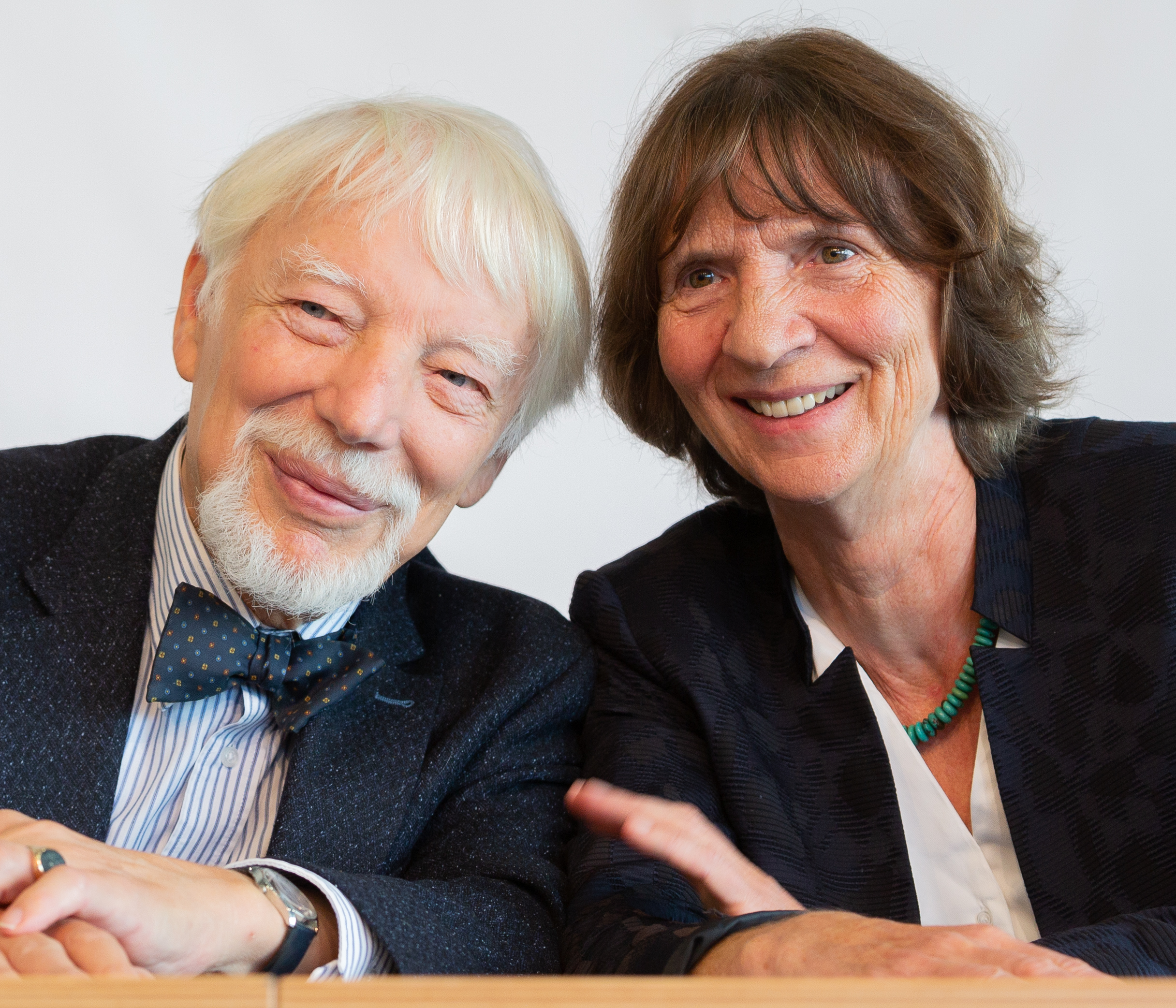 Jan und Aleida Assmann, die Preisträger des Friedenspreises des deutschen Buchhandels 2018, bei einer Pressekonferenz im Rahmen der Frankfurter Buchmesse 2018